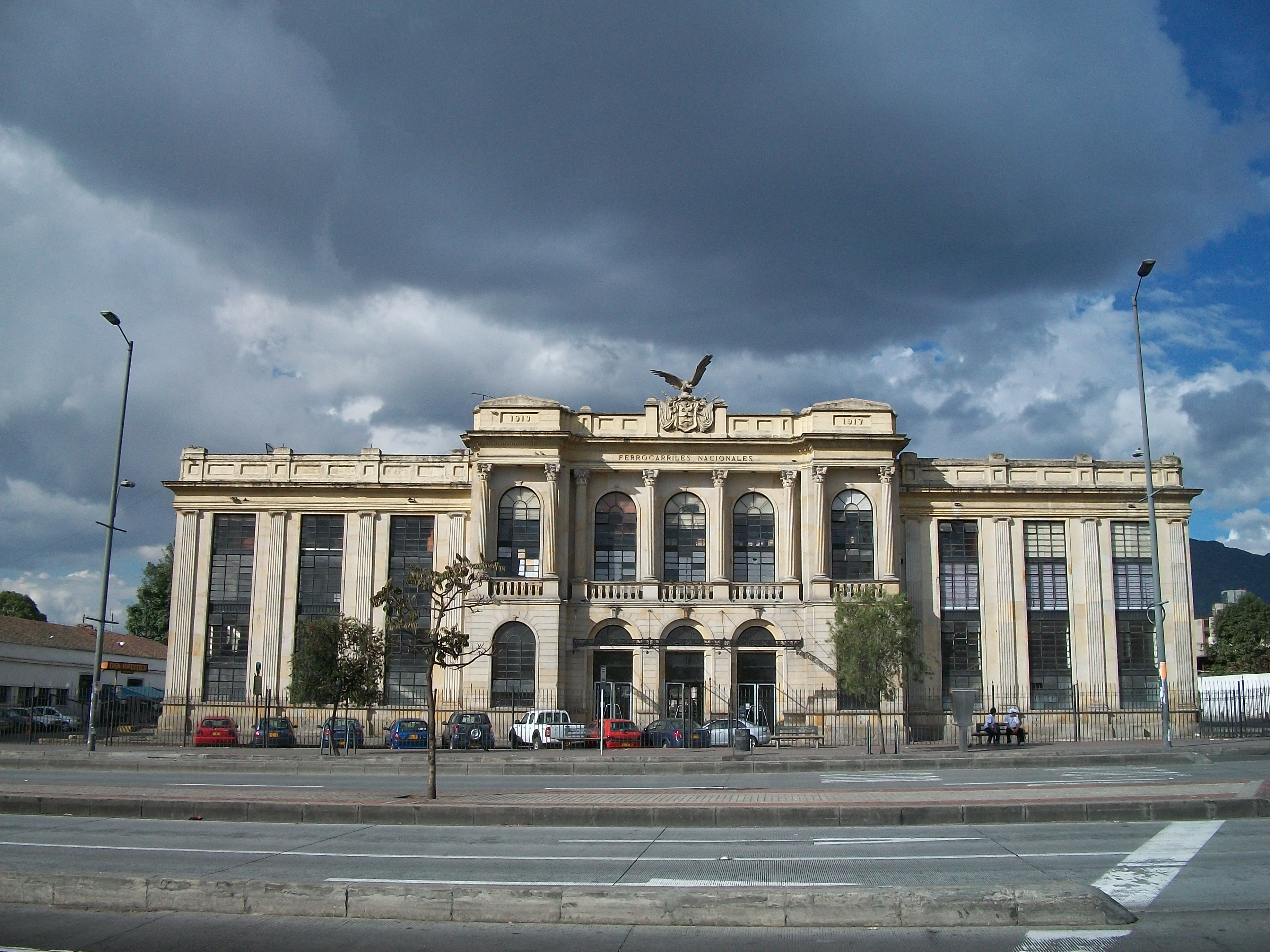 Fachada de la Estación de la Sabana de Bogotá.